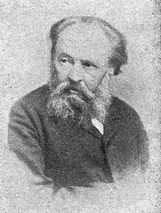 Pictorul Gheorghe Panaiteanu-Bardasare (1816-1900)